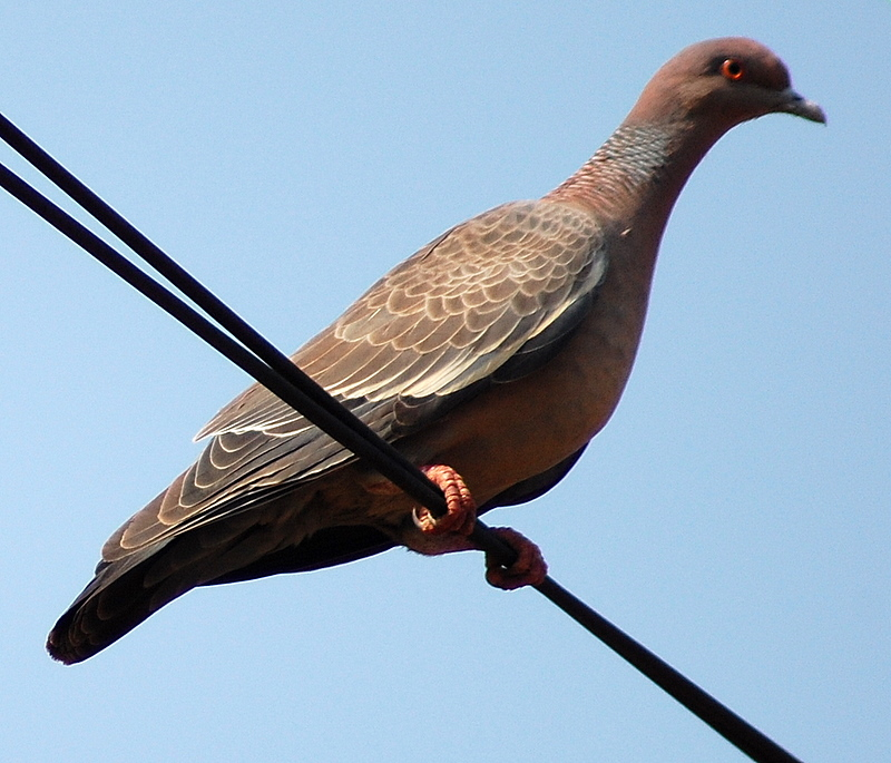 "Território dos Calçados" em Jau-SP